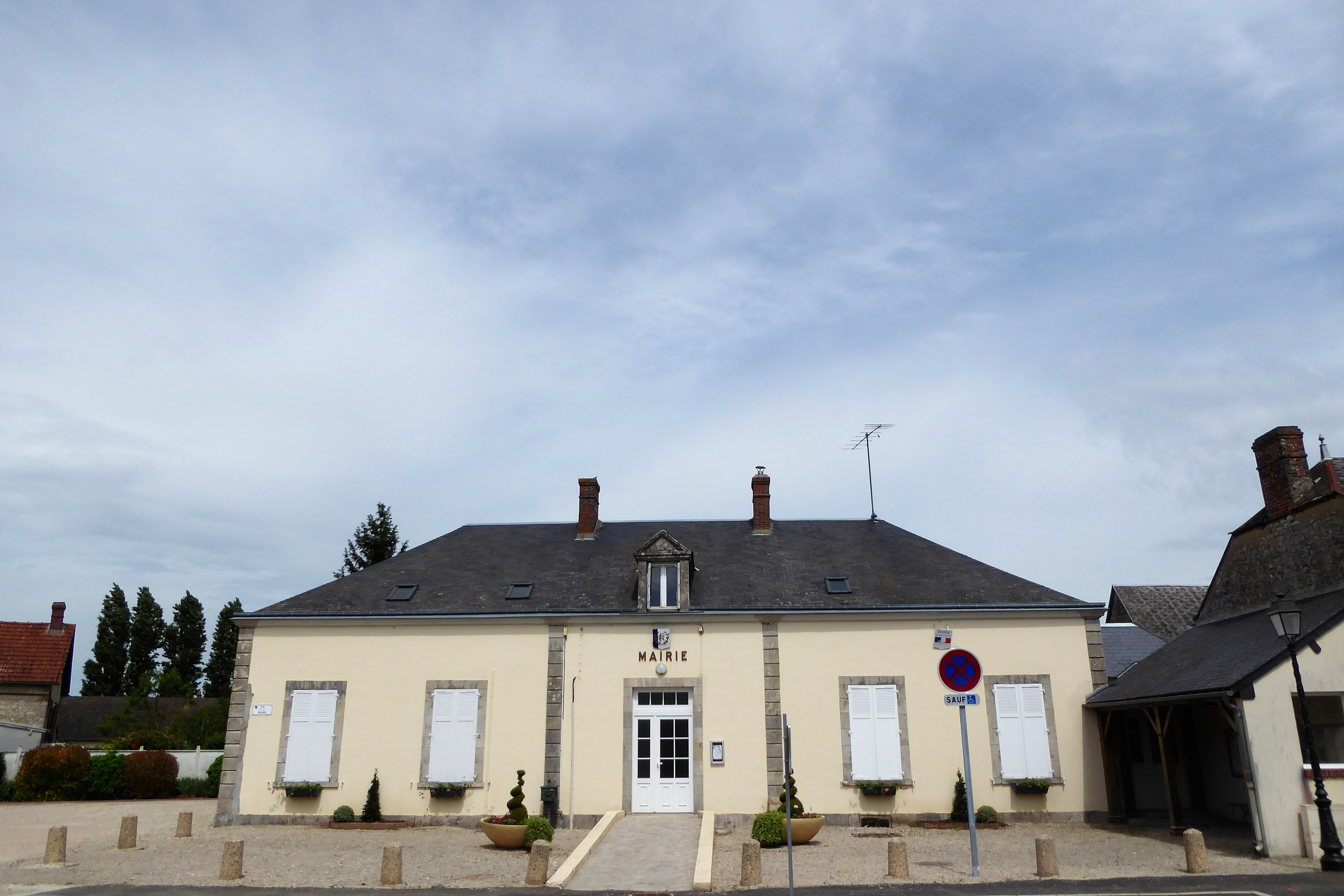 mairie de Prasville, Eure-et-Loir, France.